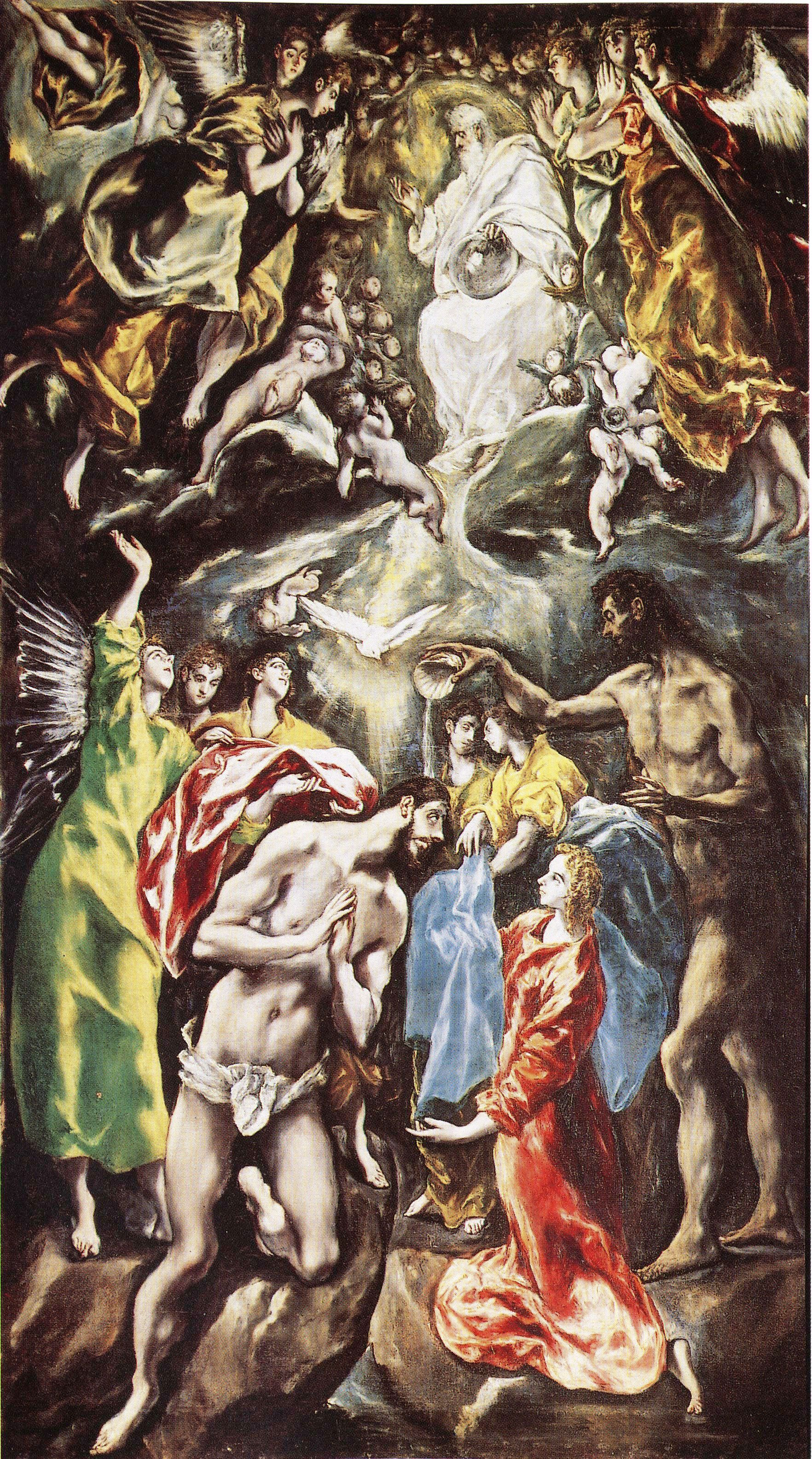 La obra representa el momento en que Jesucristo fue bautizado en el Jordán por el profeta San Juan Bautista.